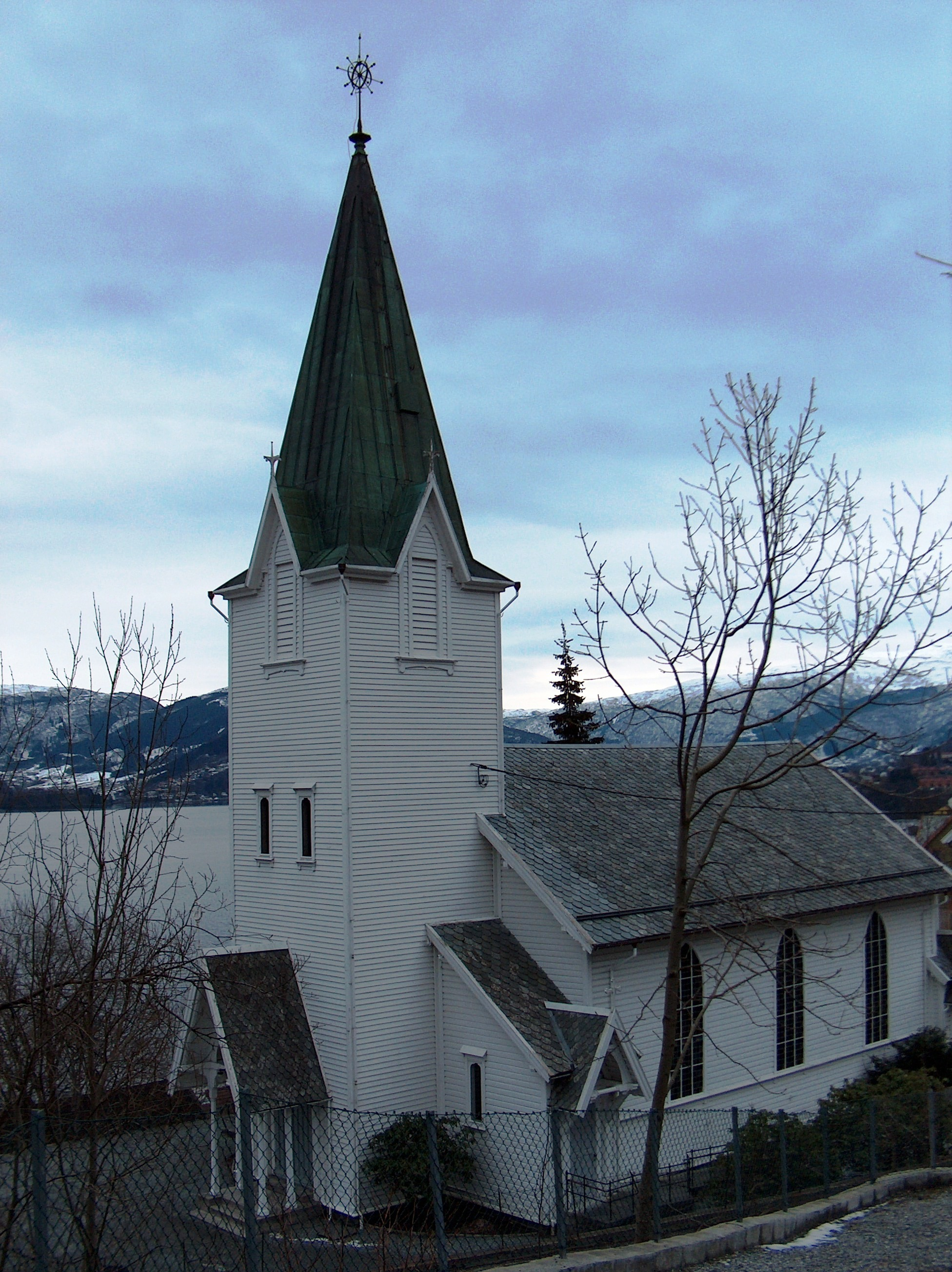 Ytre Arna kirke